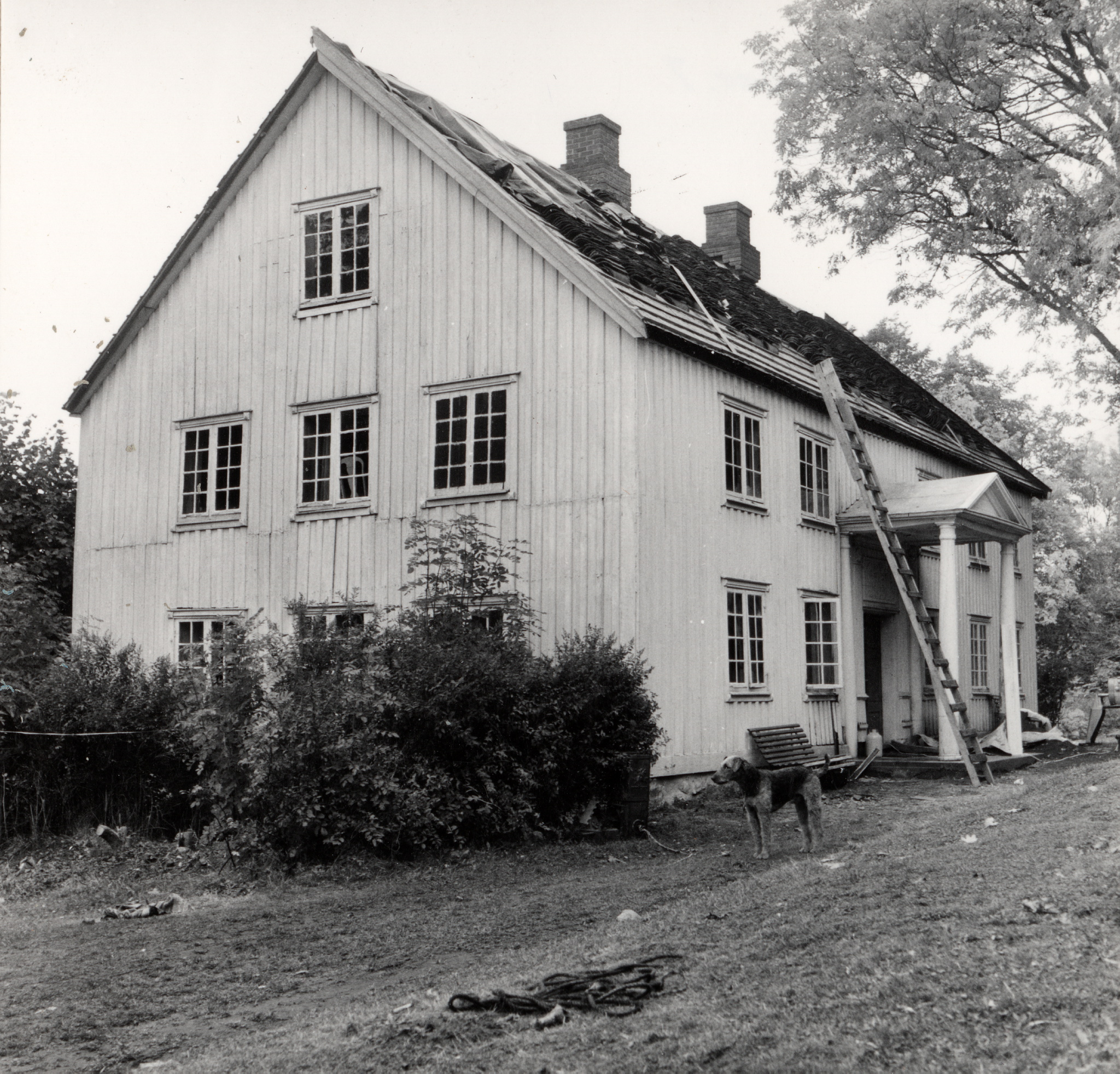 Agerup, Nøtterøy. This image on crowdsourcing geotagging platform Fotodugnad